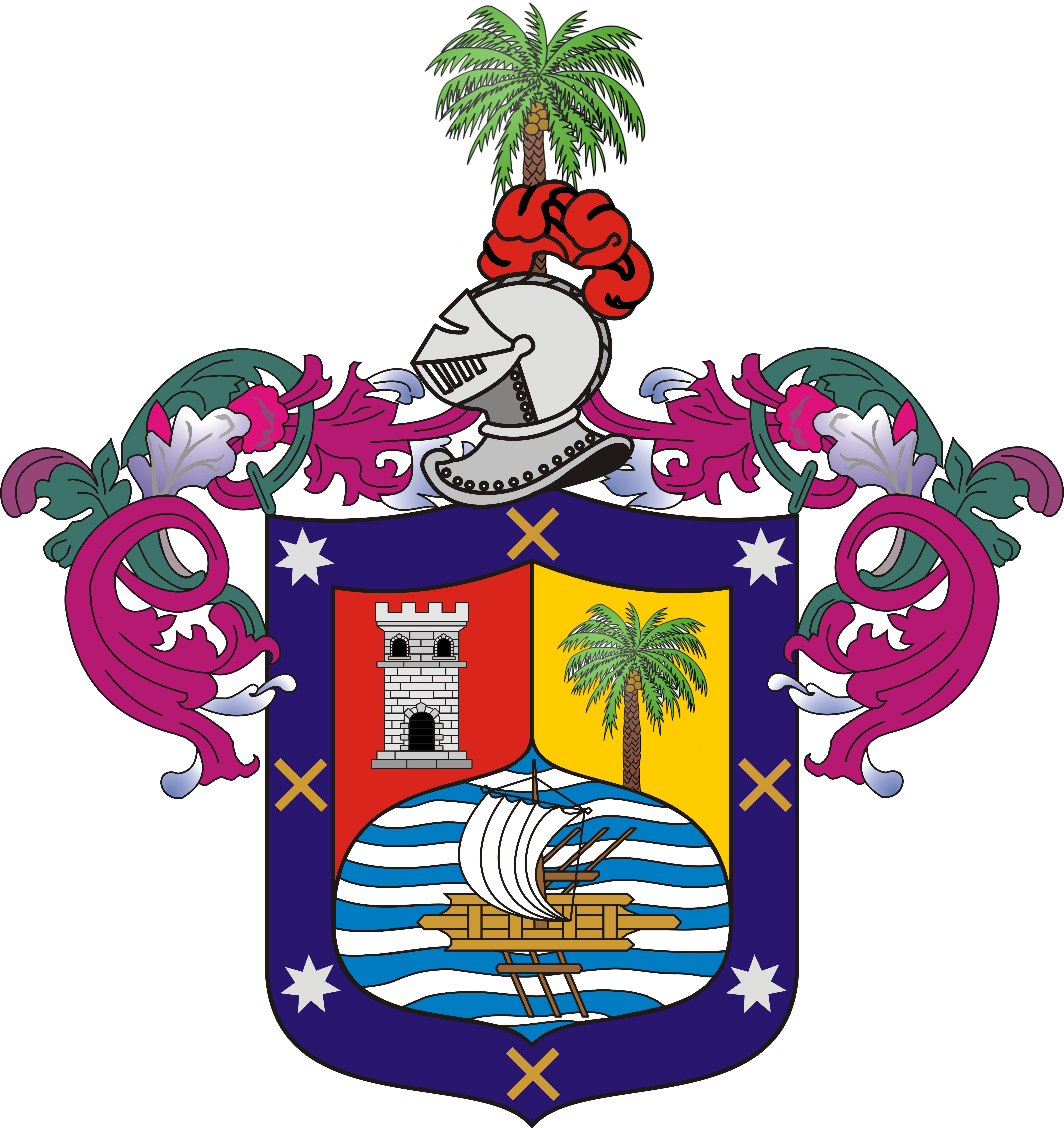 Cristóbal Rodríguez, que tengáis por sus armas un escudo curvomantelado de tres cuarteles; en el primero una torre de plata mazonada de sable en campo colorado; en el segundo un árbol de coco con sus frutos de sinople en campo de oro; en el tercero principal una balsa de indios de Puerto Viejo esmaltada de oro y cargada de seis remos contraembrazados de castaño, los tres arriba y los otros debajo de dicha balsa con una vela de su misma pose de plata que sopla el levante y cubre el primer remo de arriba, sobre un campo de aguas en cielo y plata; y por bordura de azul cuatro estrellas de plata de siete puntas acantonadas, y de oro cuatro aspas en los flancos y jefes que hay. Y por timbre un yelmo cerrado y por divisa un árbol de coco con sus frutos de sinople a lo que es muy a propósito el lugar donde yace la villa con sus erascoles y dependencias y follajes. (Archivo General de Indias/INDIFERENTE,1205 MP-ESCUDOS,48). Esta interpretación de la Cédula es una recreación literal perfecta de la documentación original de acuerdo a las usanzas escribanas de la heráldica, ya que que en la probanza donde consta señalado el escudo solamente está vigente y sobrevivió el dibujo del mismo y apenas señalados el color de esmaltes hallado en cada uno de los componentes. Lo importante es que inmortalizó al tiempo el dibujo; incluso sí cualquiera de ambos de los soportes como el escrito, no hubieran perecido, para estos casos el estudio de la heráldica define su registro como válido para cualquier caso, con el tipo de soporte documental gráfico o escrito. Esto ha ocurrido con muchos escudos de armas; de hecho mucho de los certificados de hidalguía o las concesiones de armas para las ciudades han reconstruido su historia en base a estudios por esta dual manera de rescate histórico. Descifrado, interpretado, consultado y compartido por Jodison Javier García Alcivar